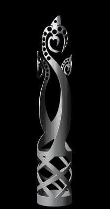 Estatuilla Premios Macondo.